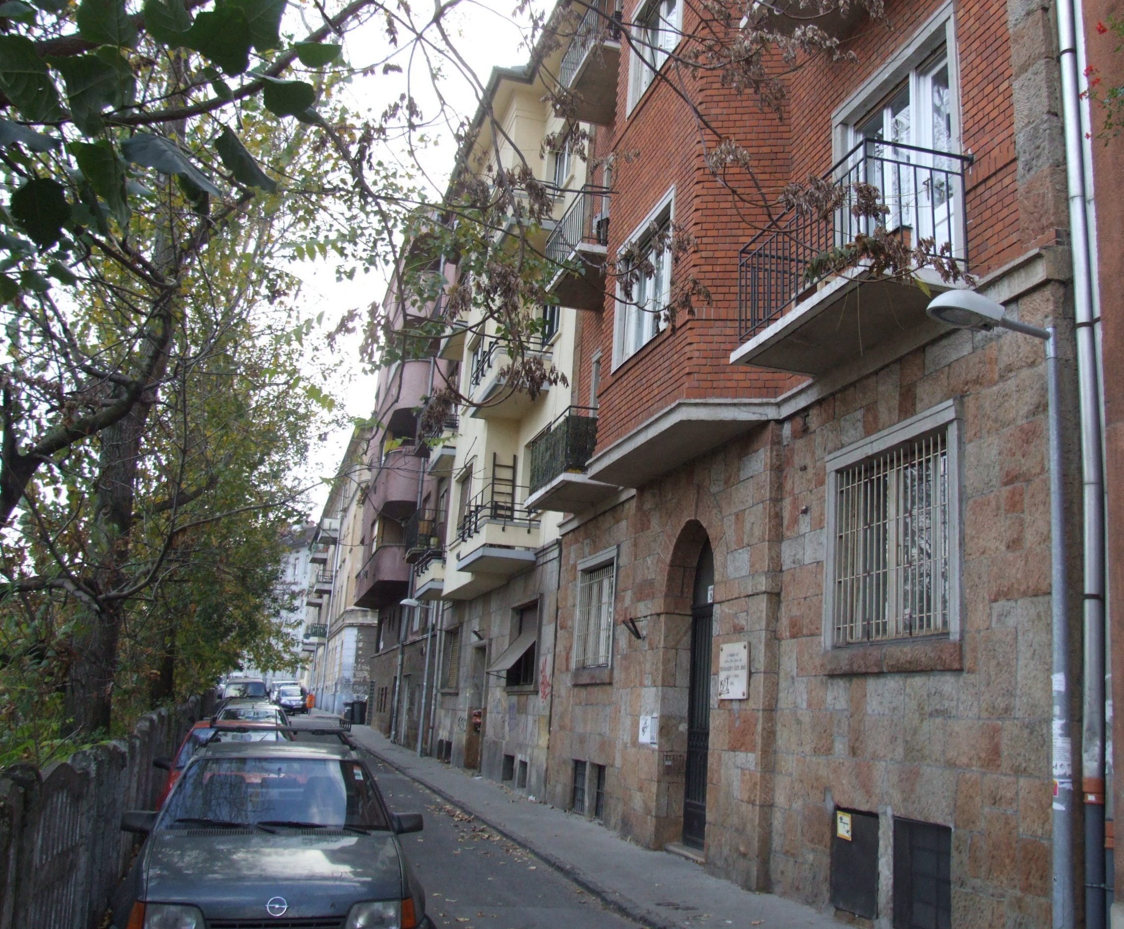 Tersánszky Józsi Jenő lakóháza a XII. kerületi Avar utcában. A lakásának ablaka a földszinten a bejárattól balra látható!